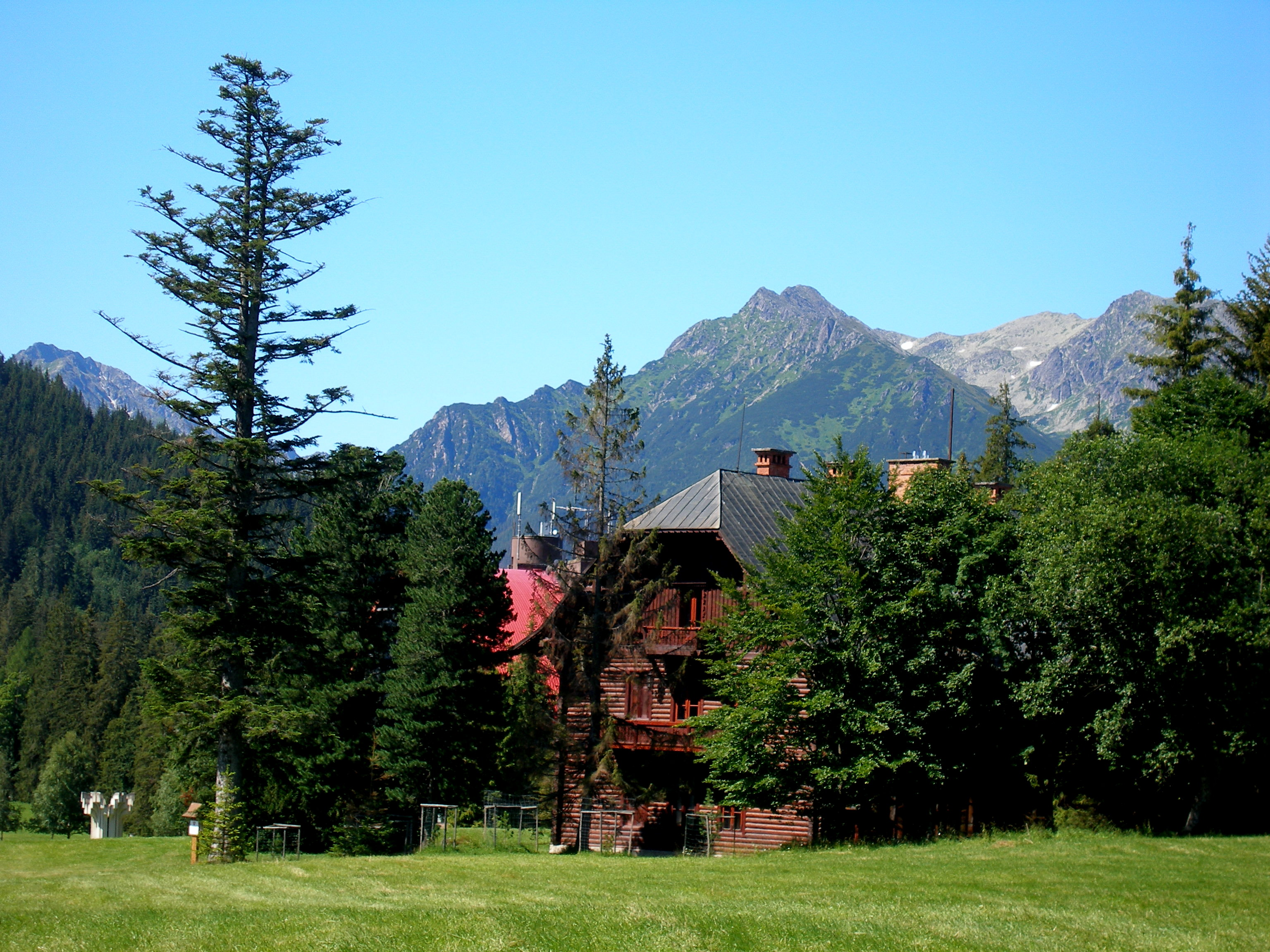 Podtatranská obec Tatranská Javorina.